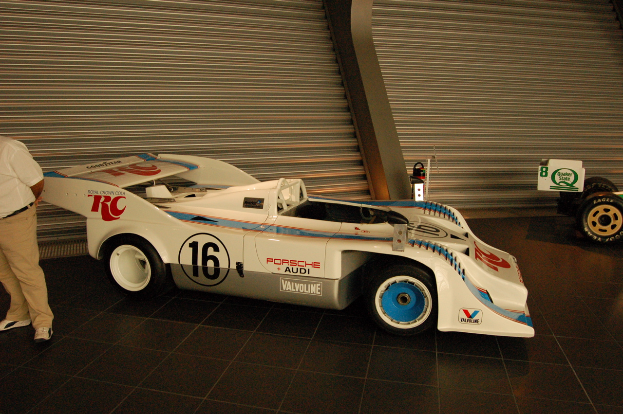 Porsche 917/10 CanAm Spyder